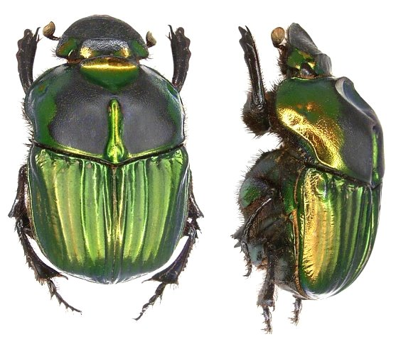 Familie: Scarabaeidae Grösse: 13-23 mm Verbreitung: Argentinien, Bolivien, Brasilien, Paraguay Fundort: Argentinien, Sierra Grandes, Las Rabonas leg.1968; det. U.Schmidt Foto: U.Schmidt, 2006